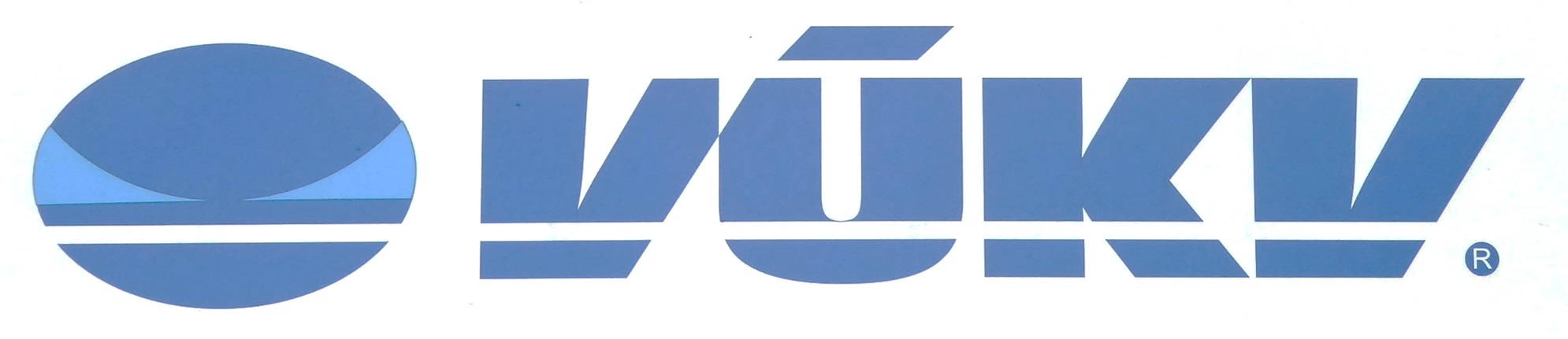 Logo des Výzkumný ústav kolejových vozidel (VÚKK, Forschungsinstituts für Schienenfahrzeuge) in Prag